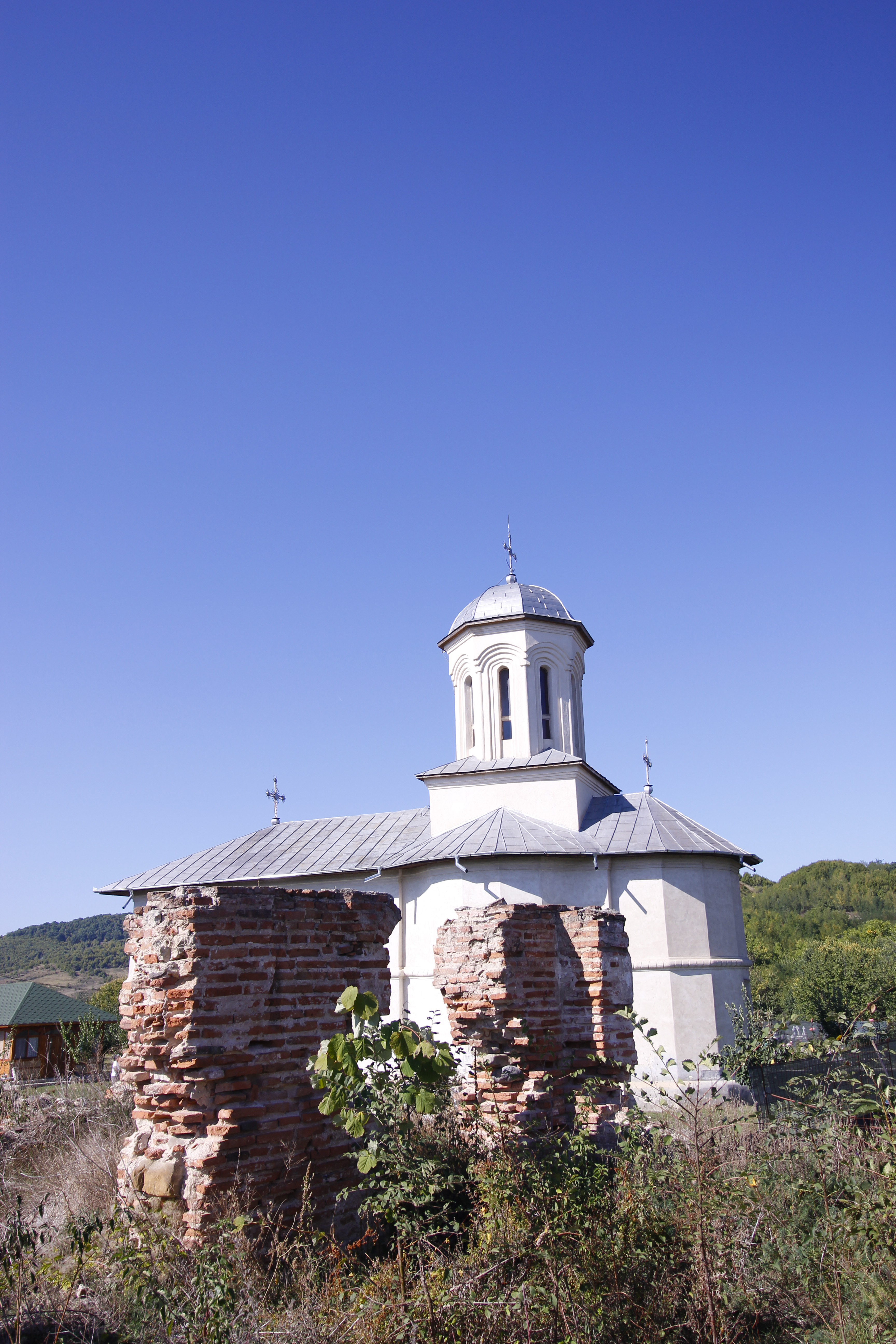 Zid de incintă (ruină) 05